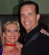 Hunter Johnson